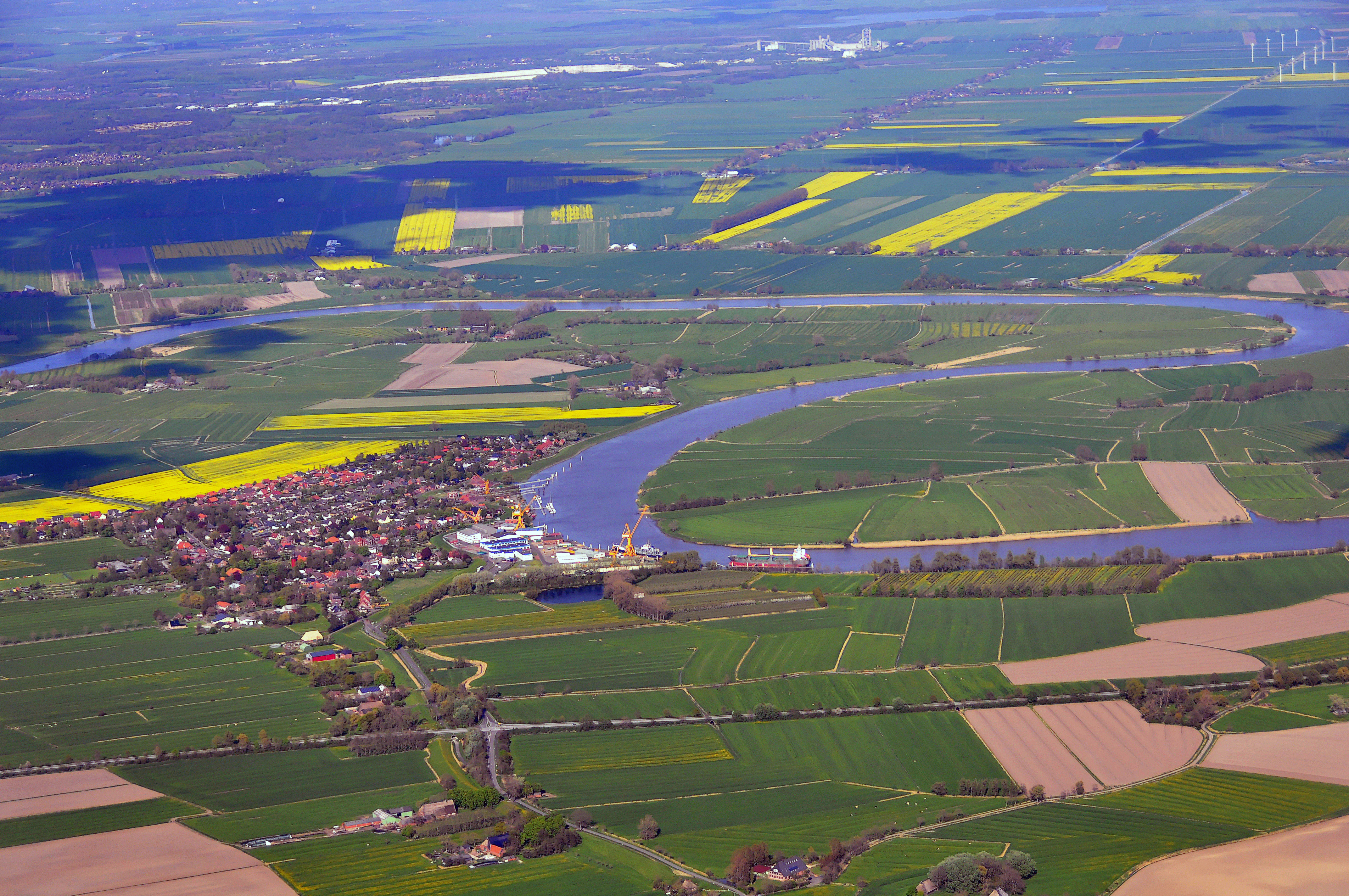 Luftbilder von der Nordseeküste 2012-05